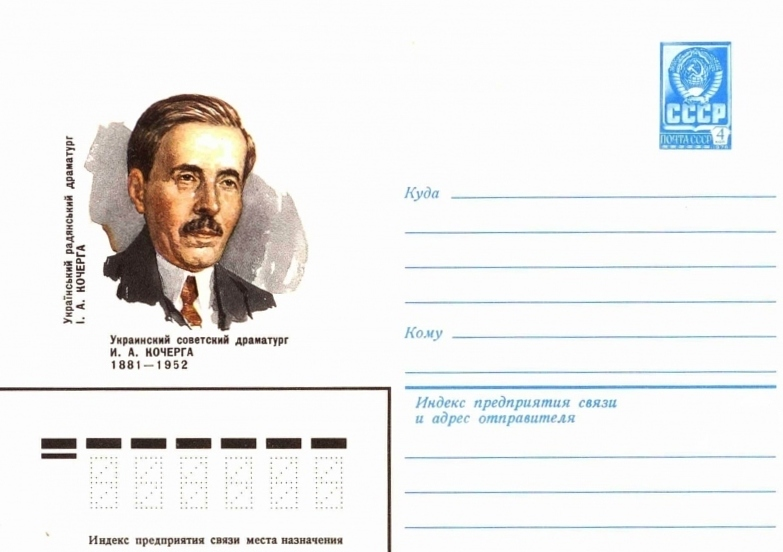 Художественные маркированные конверты 1981 года.